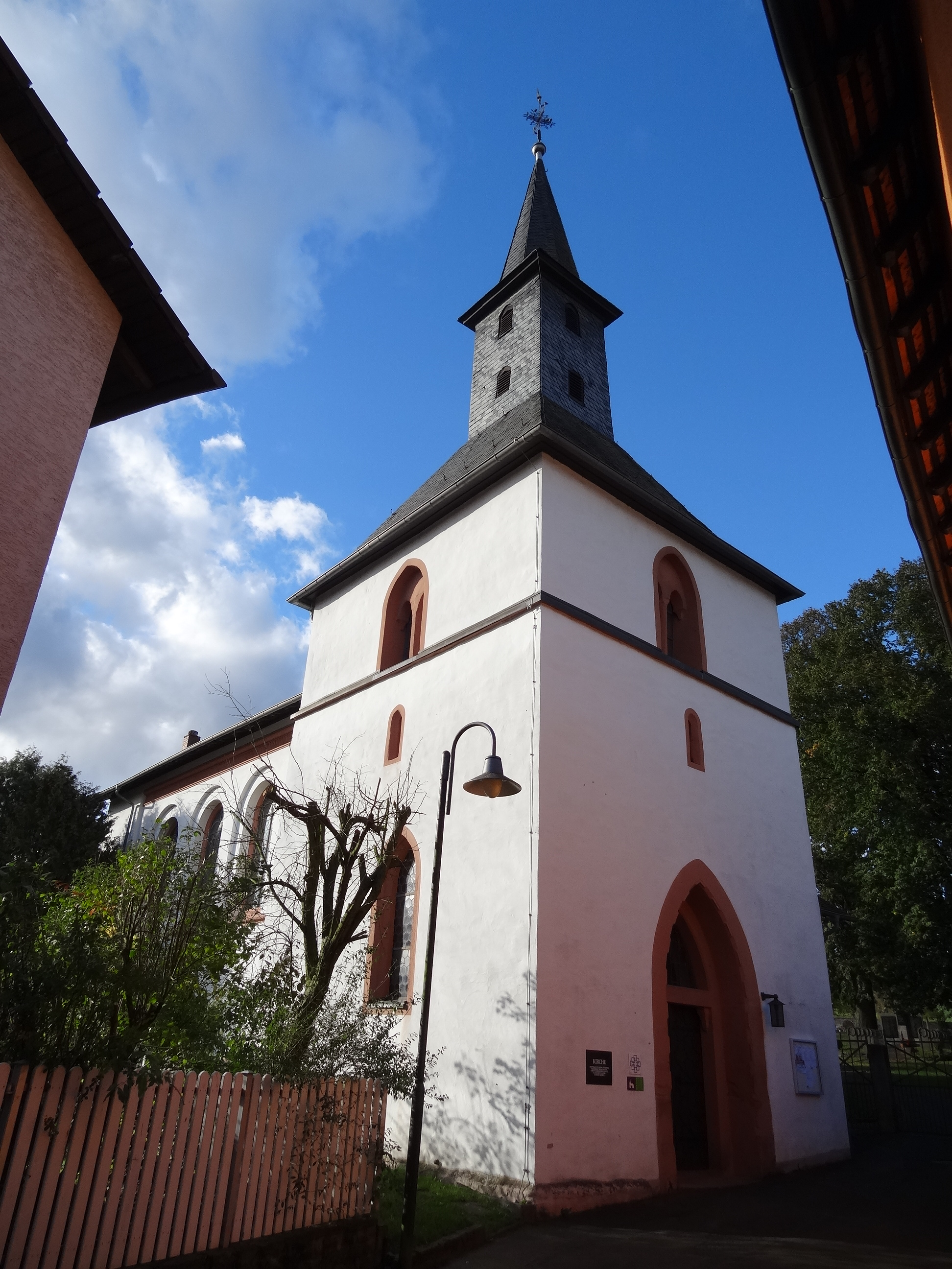 Evangelische Pfarrkirche Langd